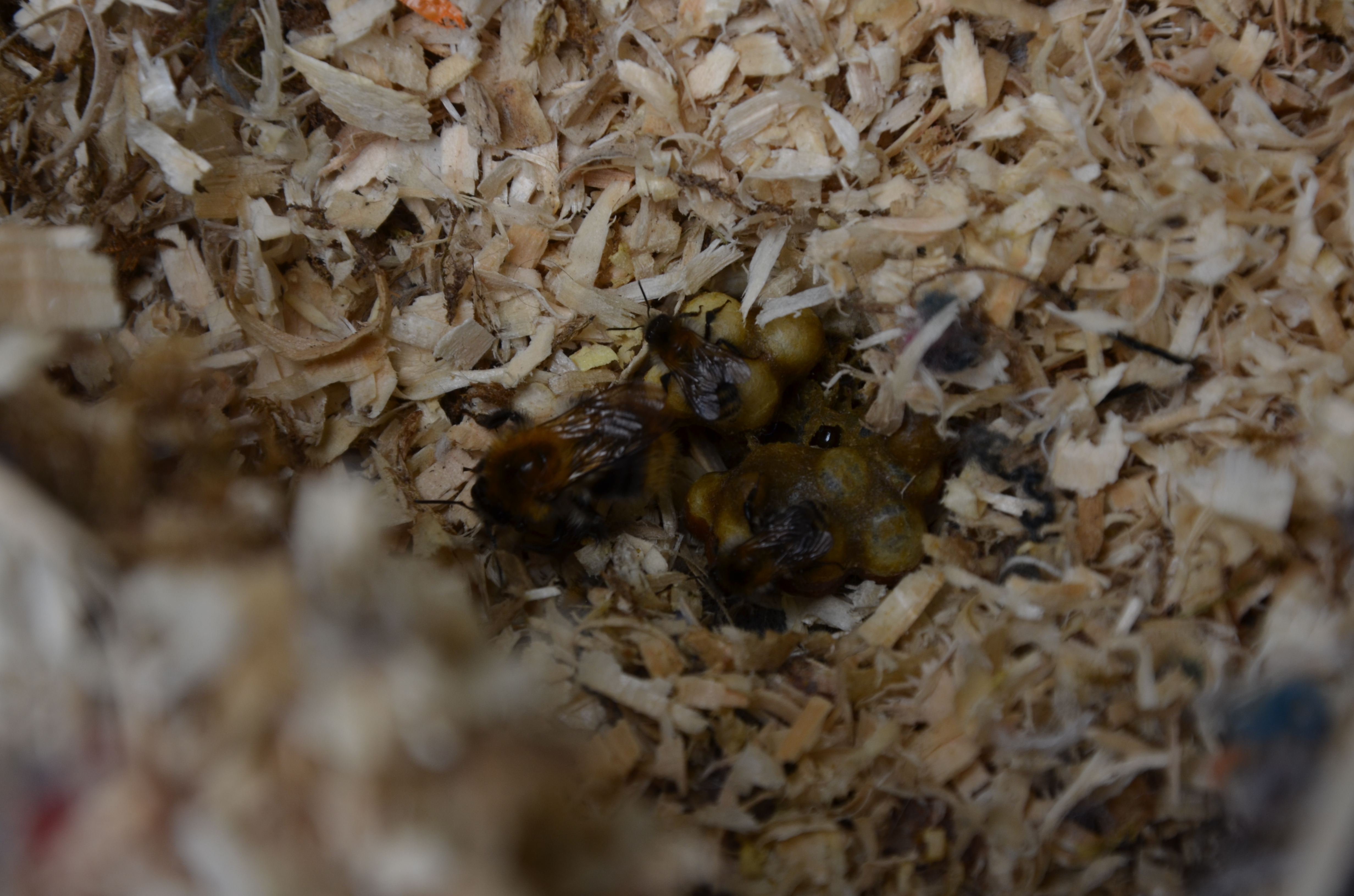 Ackerhummelnest mit Königin in einem Hummelnistkasten